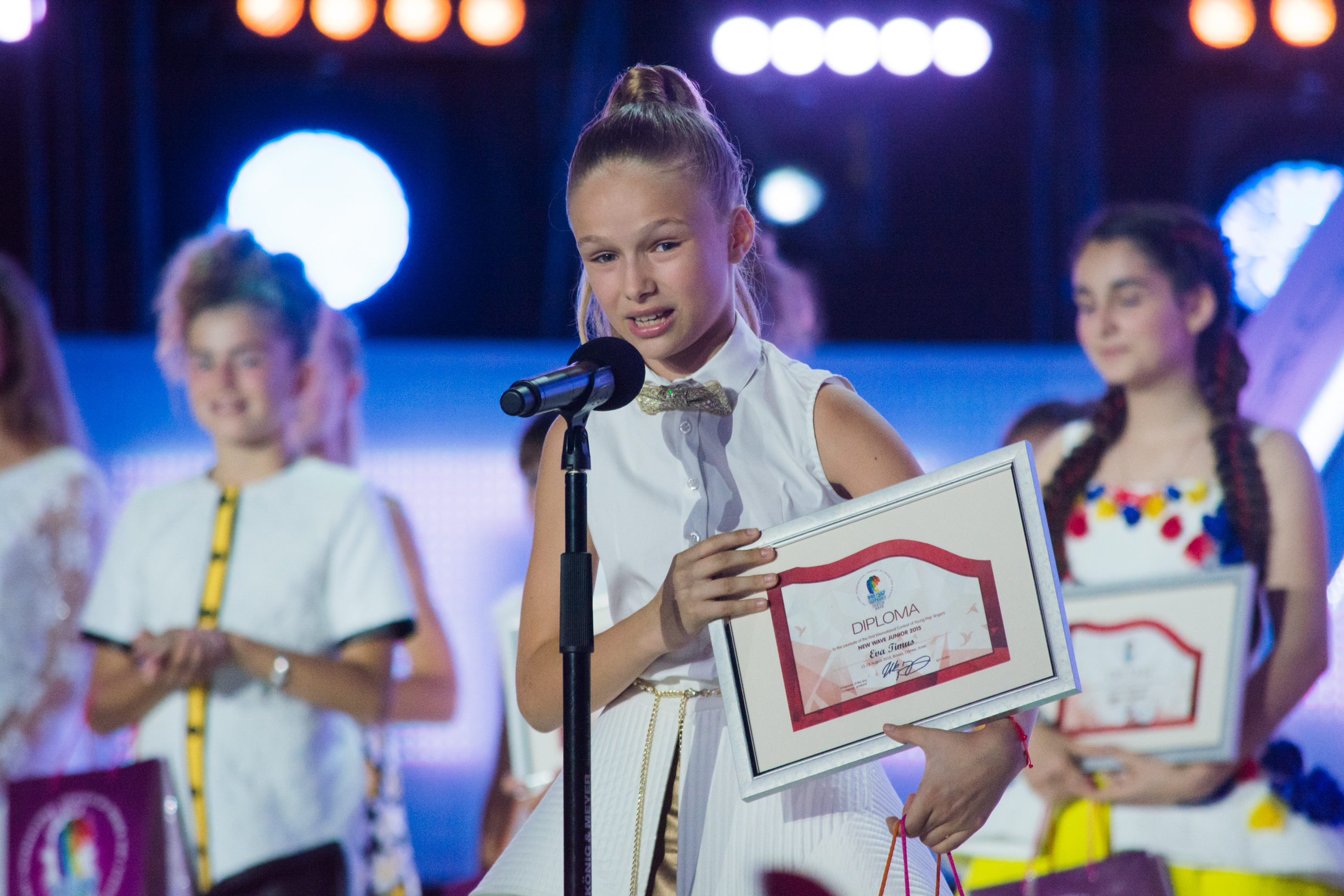 Ева Тимуш на Детской Новой волне 2015